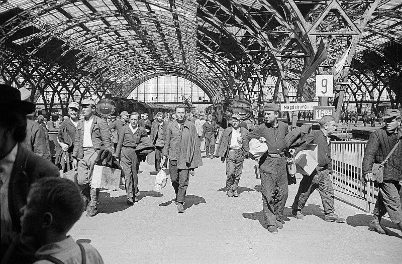 Original image description from the Deutsche Fotothek Heimkehrer am Bahnsteig